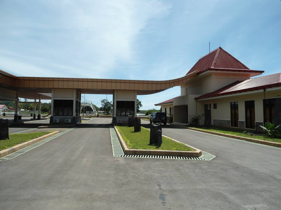 Posto de Fronteira de Batugade